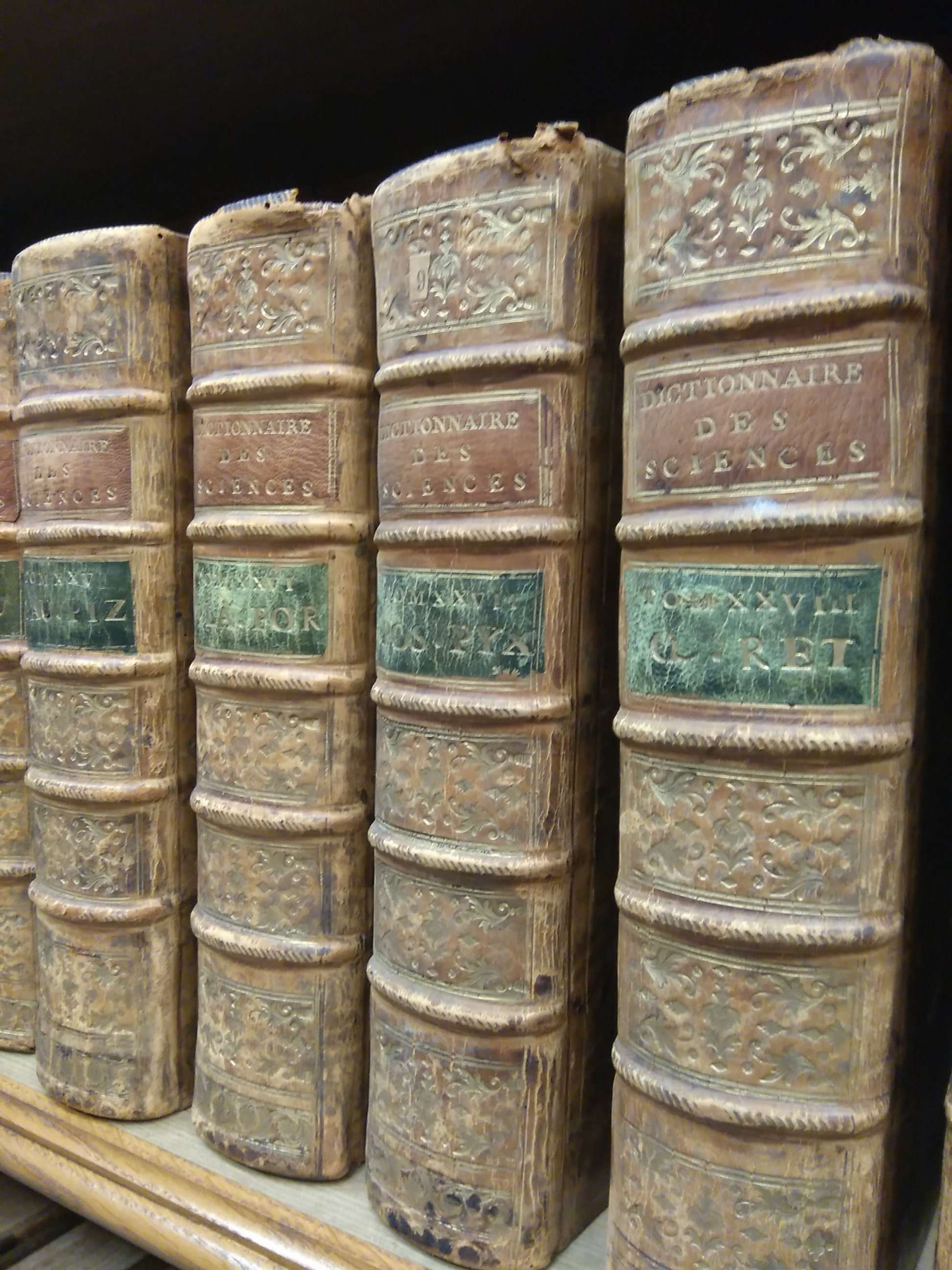 Extrait du fonds patrimonial de la bmi d’Épinal, vu dans la salle des boiseries.